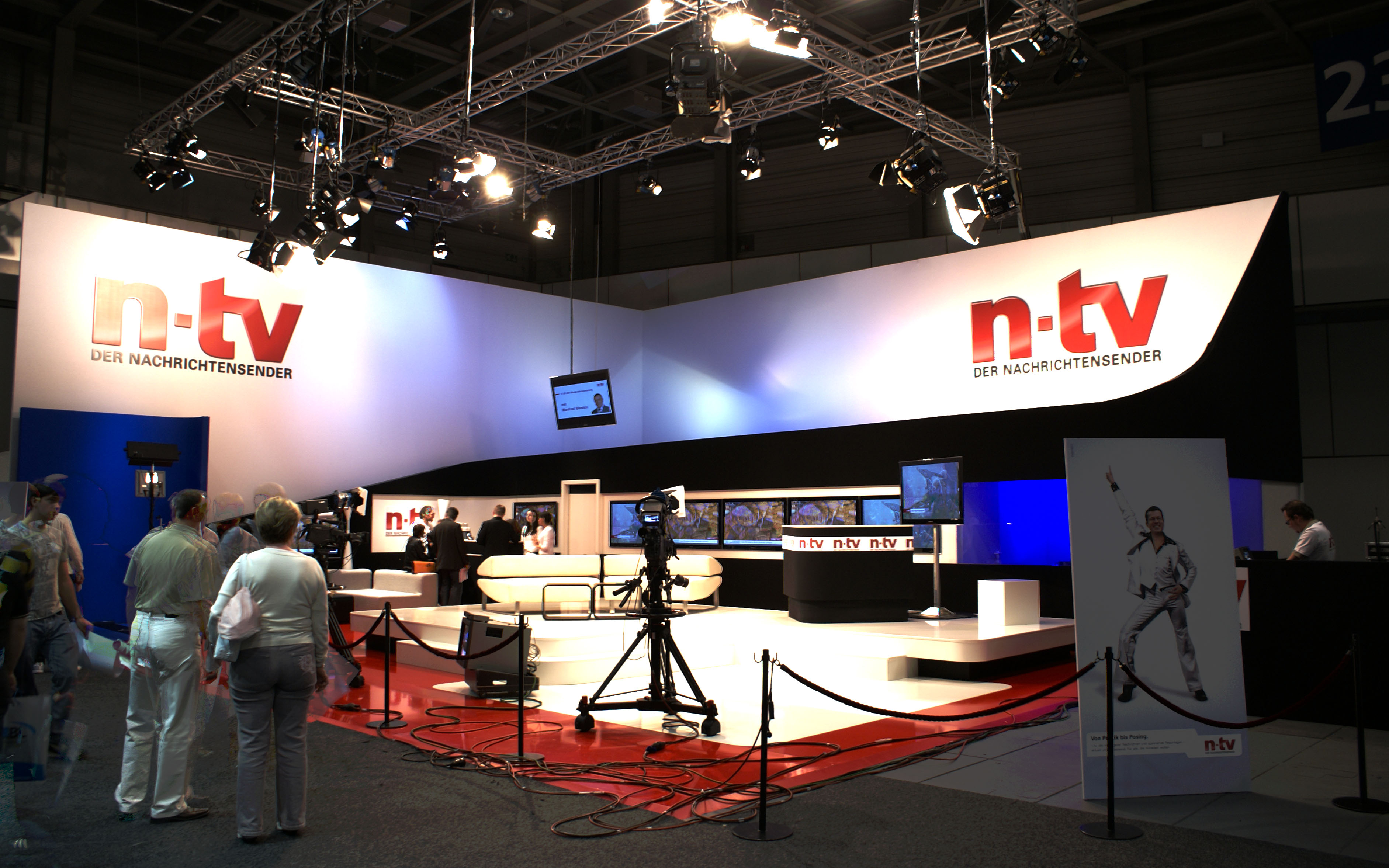 Fernsehstudio von n-tv auf der IFA 2009.